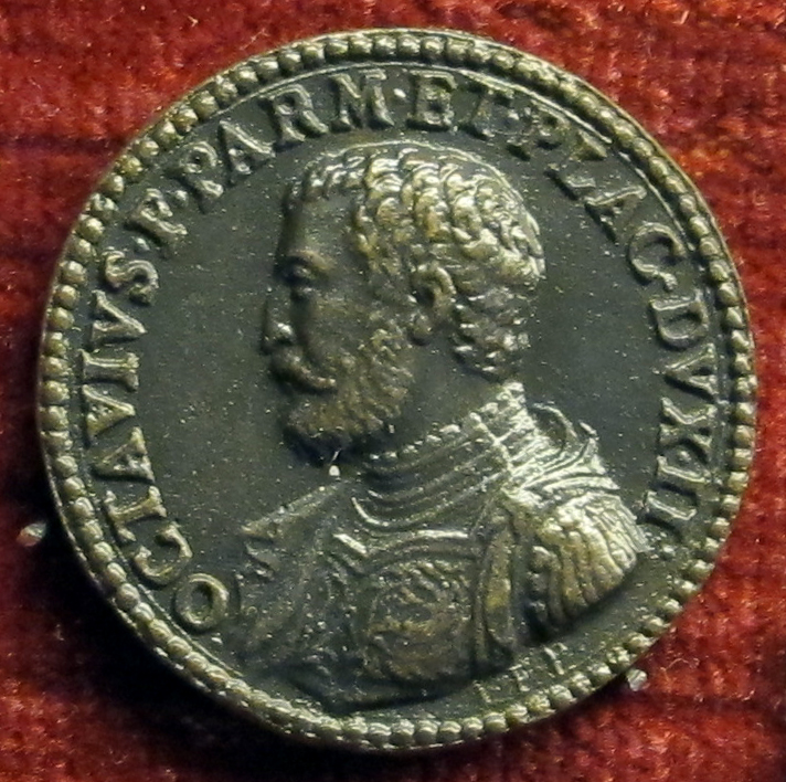 Giovan federico Bonzagni, medaglia di Pierluigi Farnese, duca di parma e piacenza